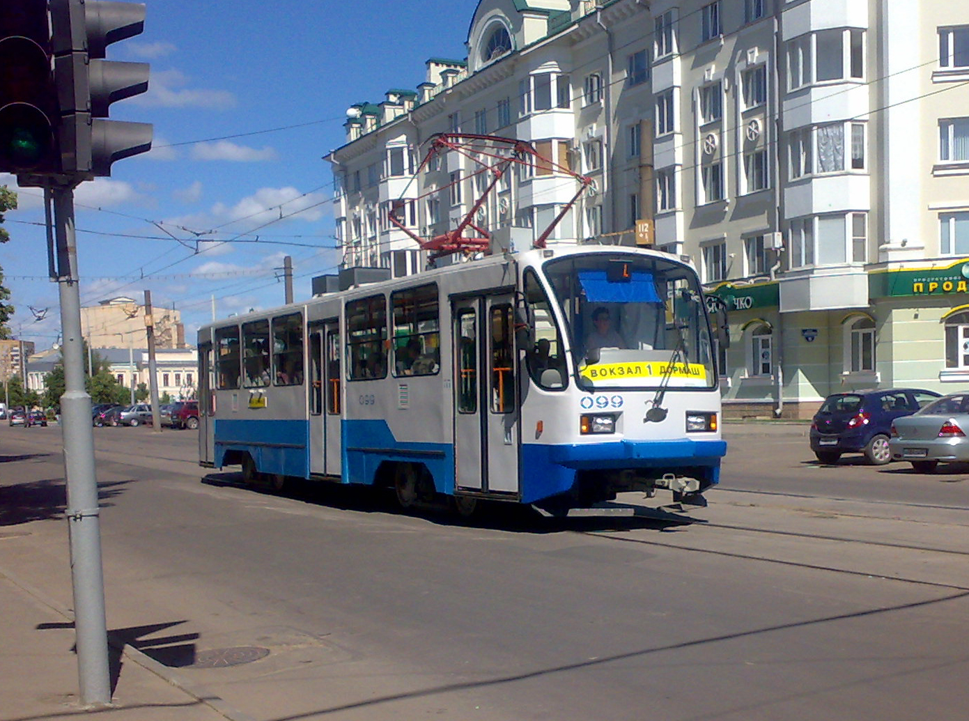 Трамвай №099 в Орле